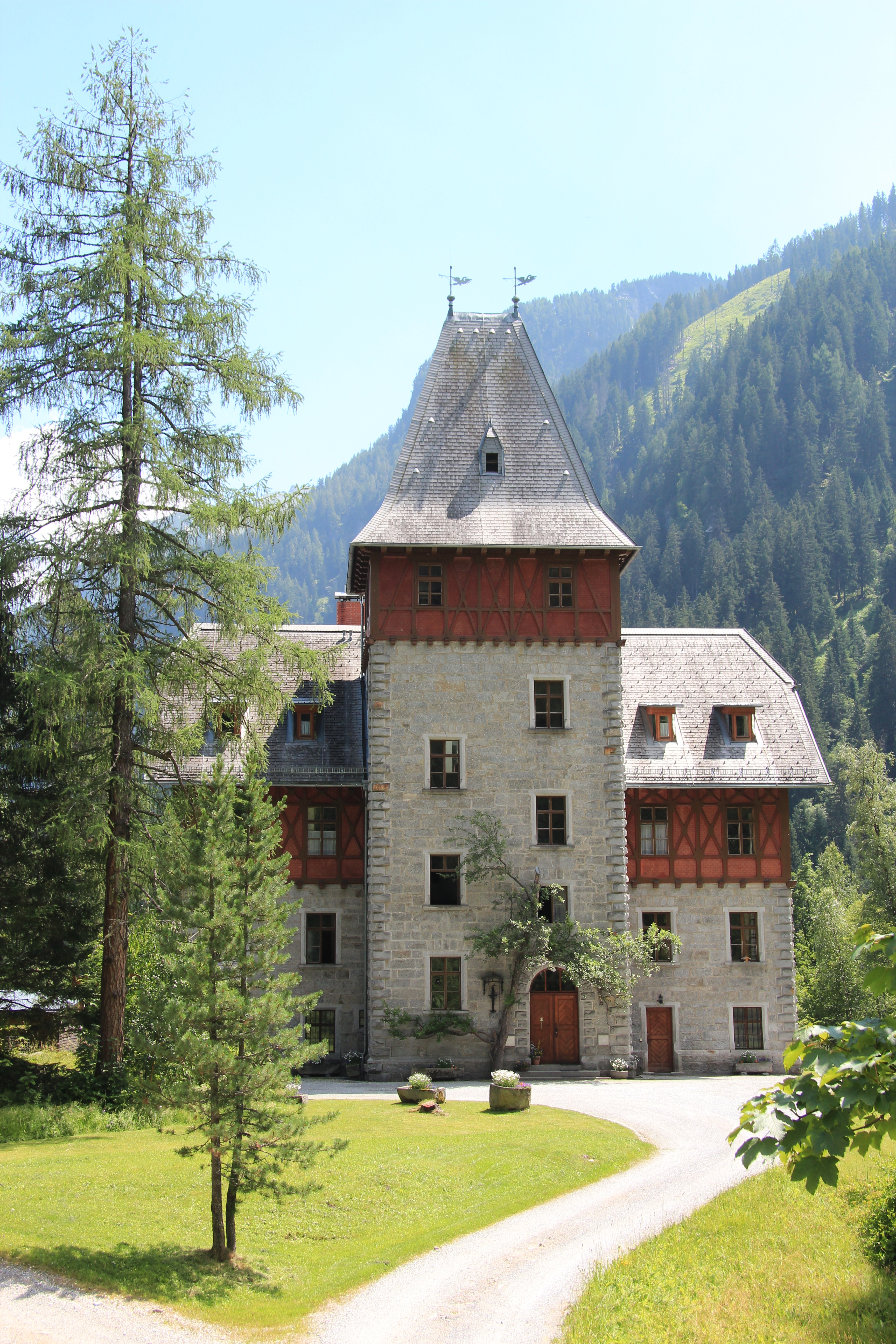 Böckstein